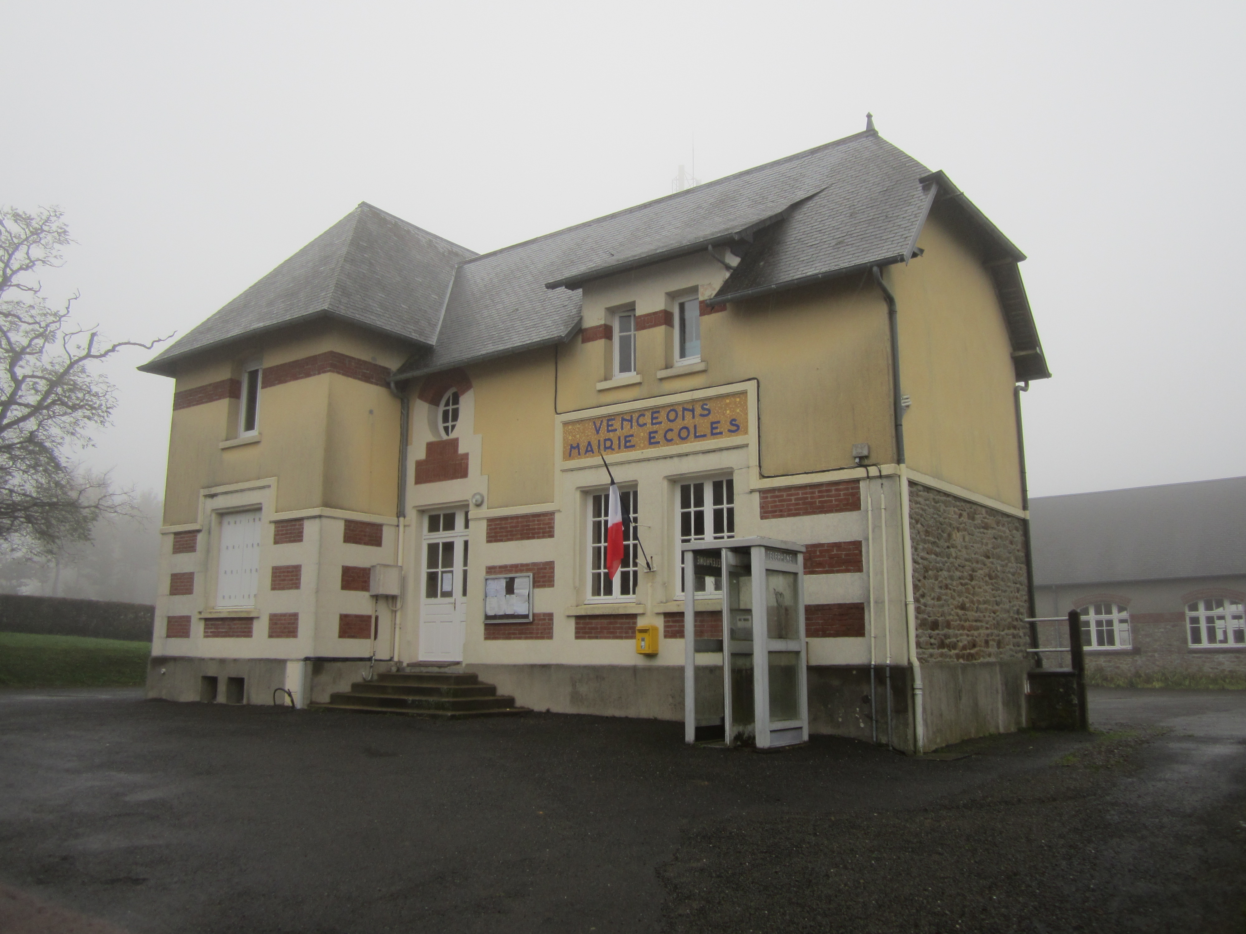 Vengeons, Manche